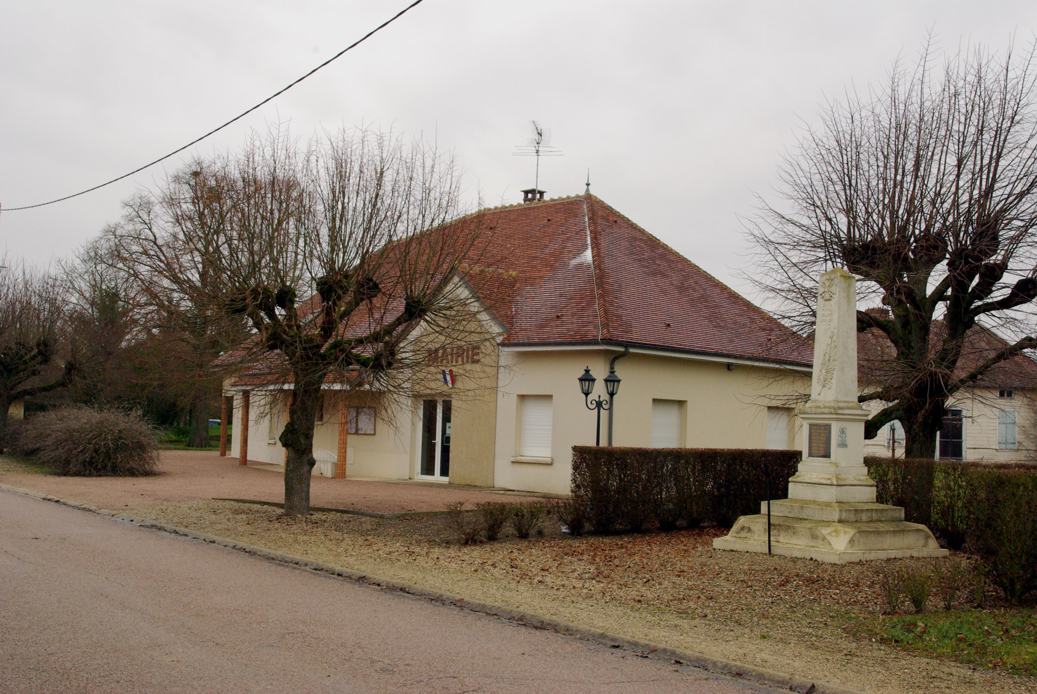 Mairie de Torcy-le-Petit